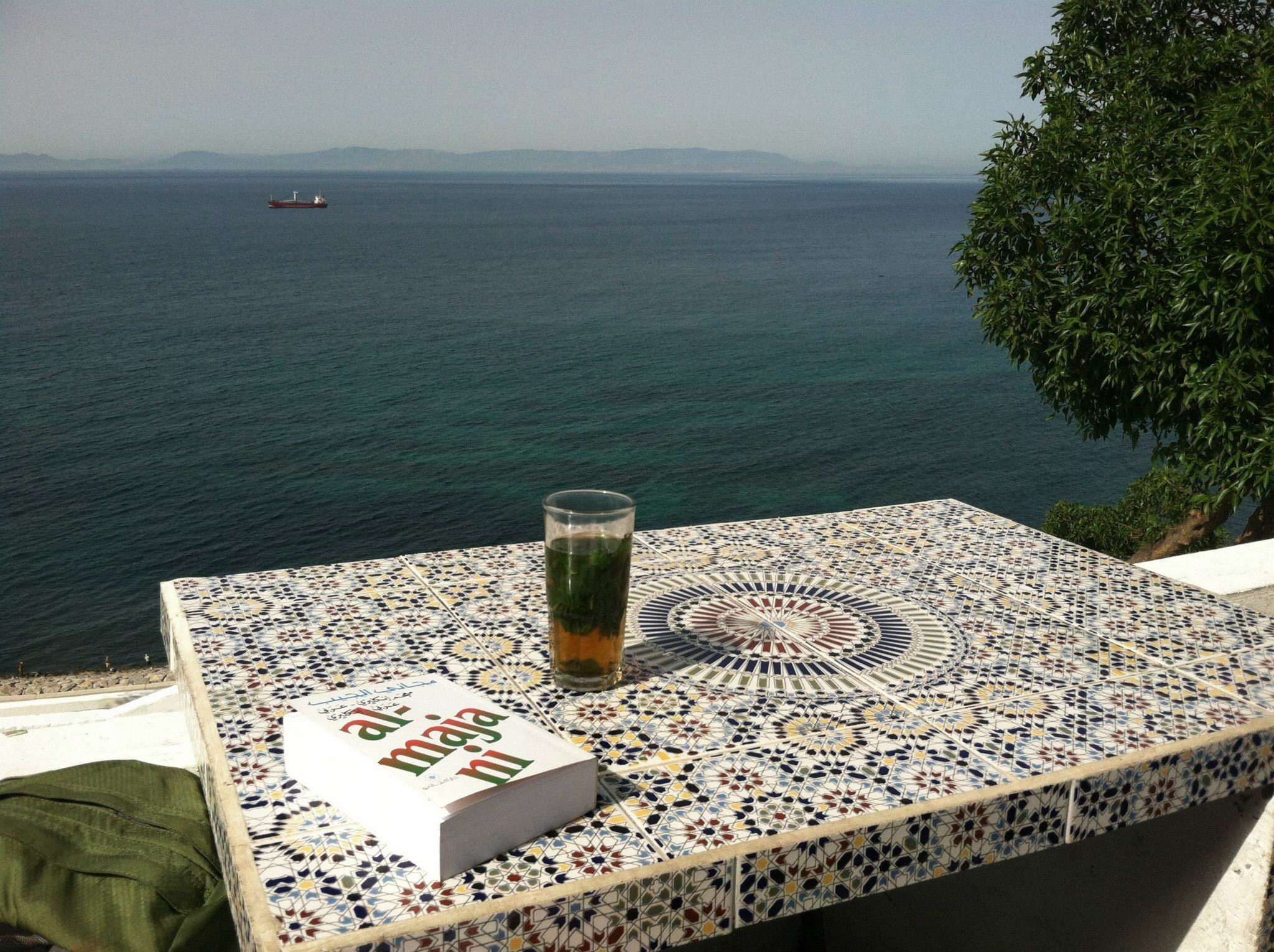 المنظر من مقهى الحافة مع كأس من الشاي المغربي ومعجم عربي